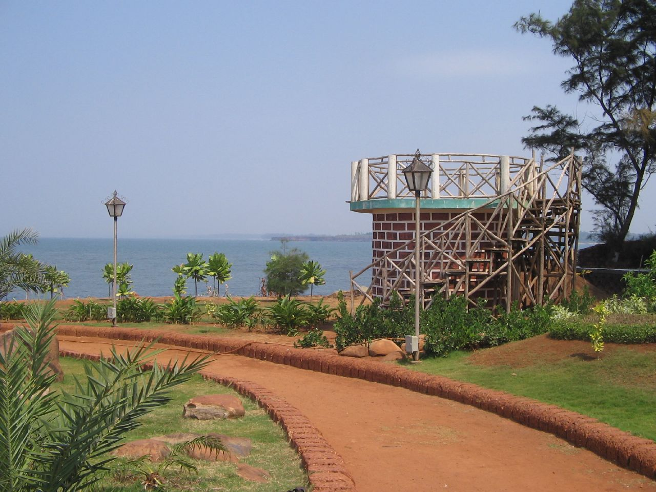 Rock Garden, Malvan